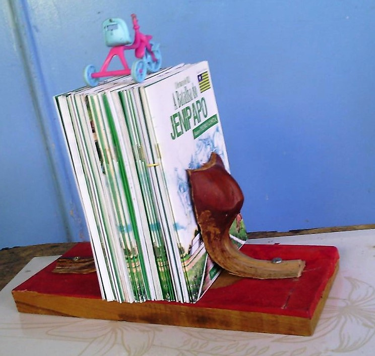 Suporte guarda livros feito com artesanato de talos de carnaúba em base de tábua de madeira. Guardando obras de literatura de cordel de autoria do poeta Pedro Costa (membro da Academia Brasileira de Literatura de Cordel) sobre a Batalha do Jenipapo.